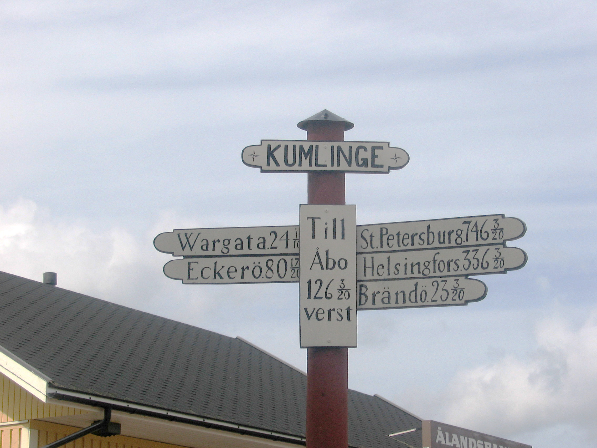 Kumlinge